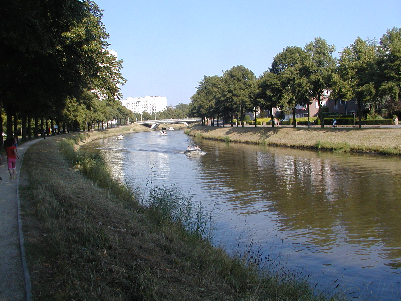 De Leie nabij de Koning Albertbrug in Gent (op de foto: Europabrug)